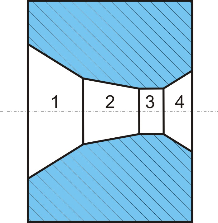 wire drawing